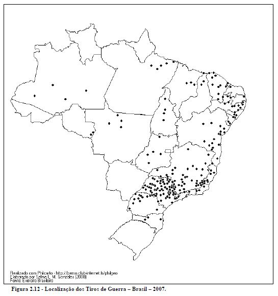 Tiros de Guerra - 2007, GONZALES, 2008